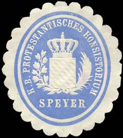 Sealing stamp Title: Königlich Bayerische Protestantisches Konsistorium - Speyer Description: hellblau, weiß, geprägt Place: Speyer size: 4x4 cm